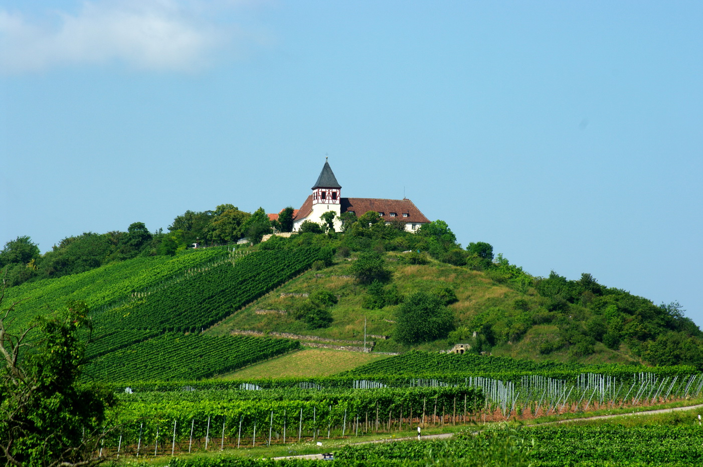 Michaelsberg bei Cleebronn von Osten